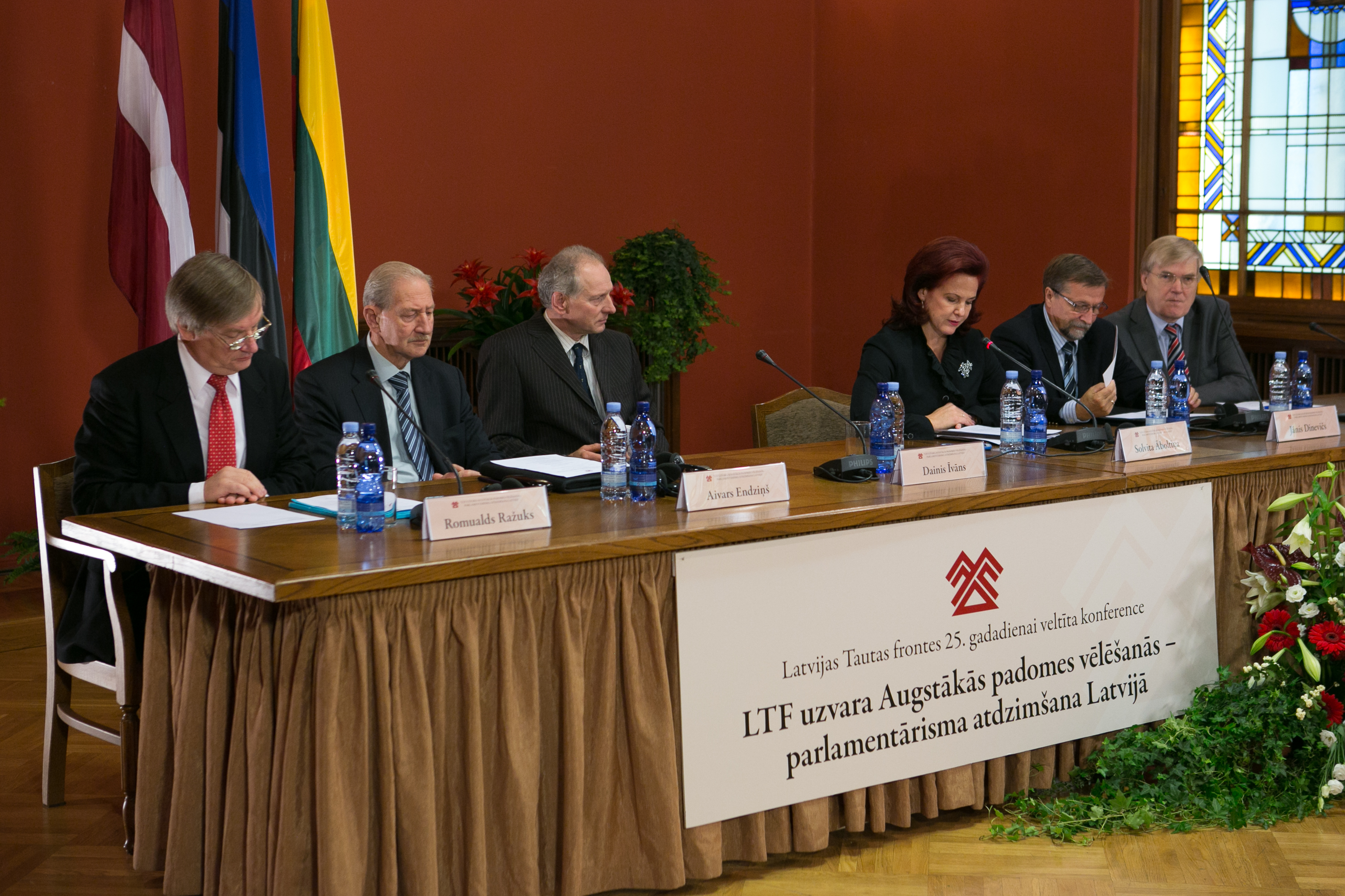 2013.gada 4.oktobris. Latvijas Tautas frontes (LTF) 25. gadadienai veltītā konference „LTF uzvara Augstākās padomes vēlēšanās – parlamentārisma atdzimšana Latvijā”. Foto: Ernests Dinka, Saeimas Kanceleja Izmantošanas noteikumi: saeima.lv/lv/autortiesibas